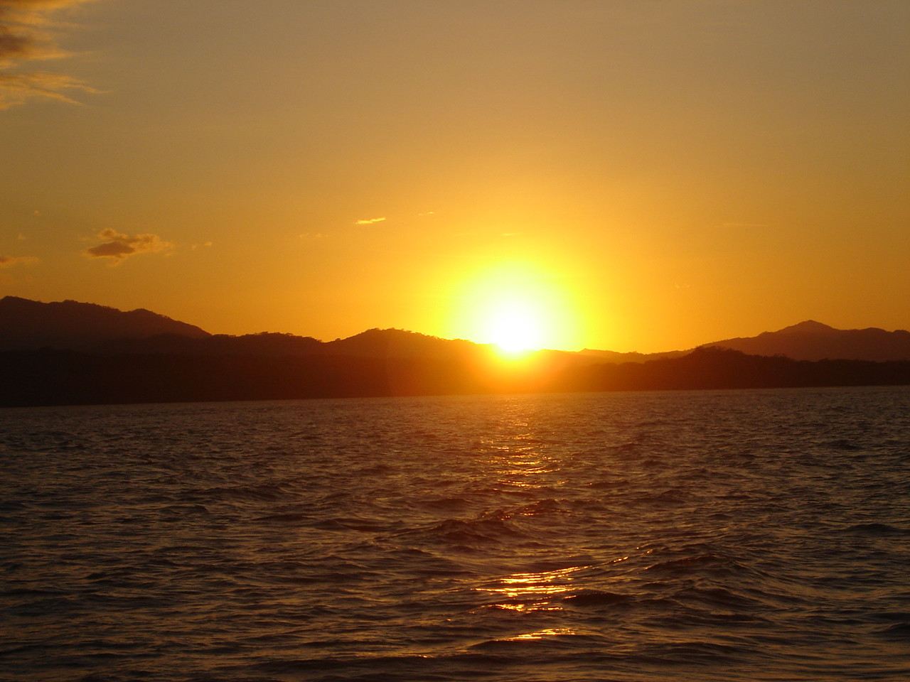 Golfo de Nicoya Costa Rica